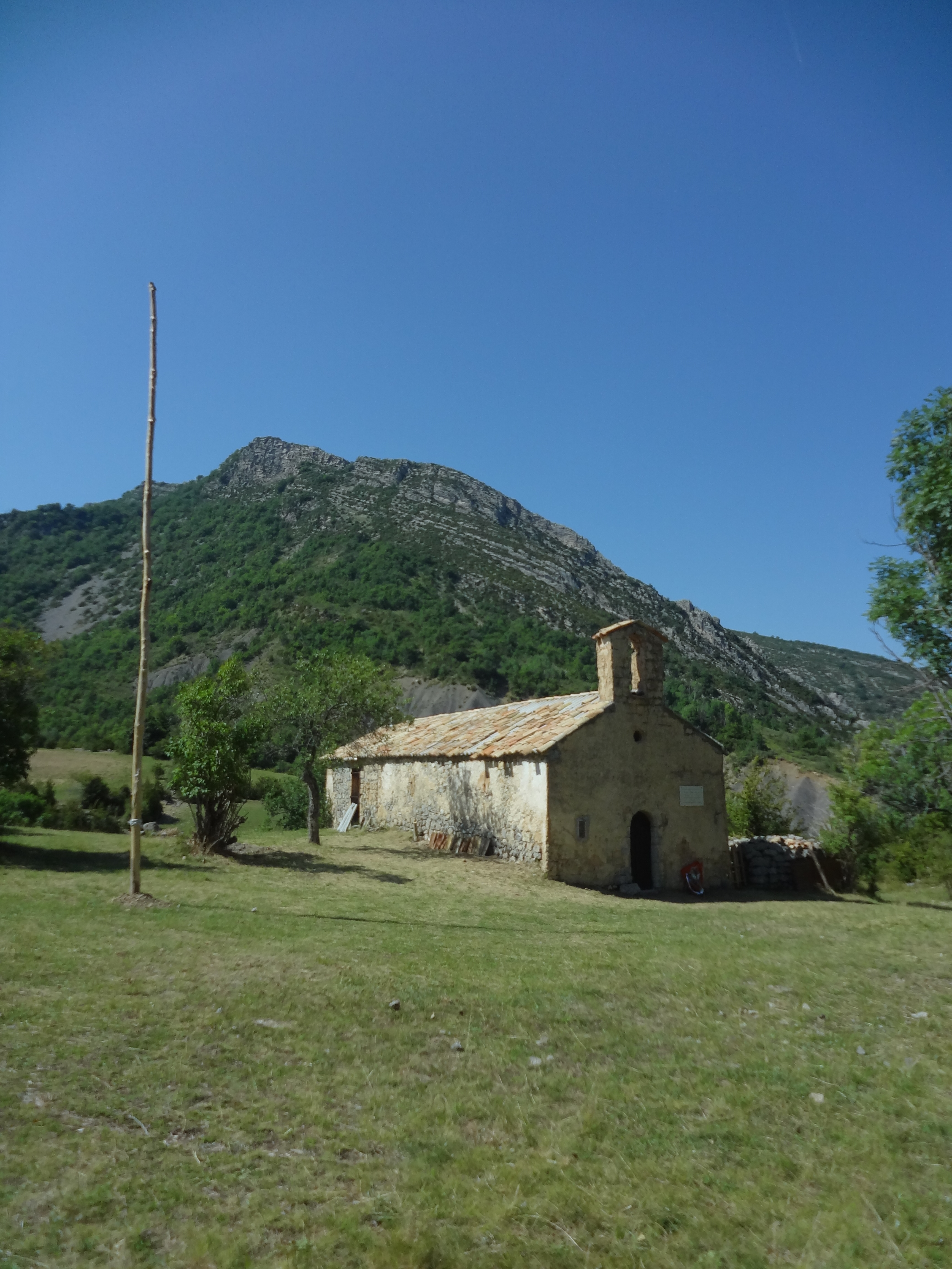 Téléchargée avec Commonist 0.9.1 Chapelle du hameau de La Basse-Melle, dernier vestige du hameau, où furent arrêtés les deux chefs du maquis Fort-de-France le 25 mars 1944. Le hameau a été ensuite incendié par les Allemands